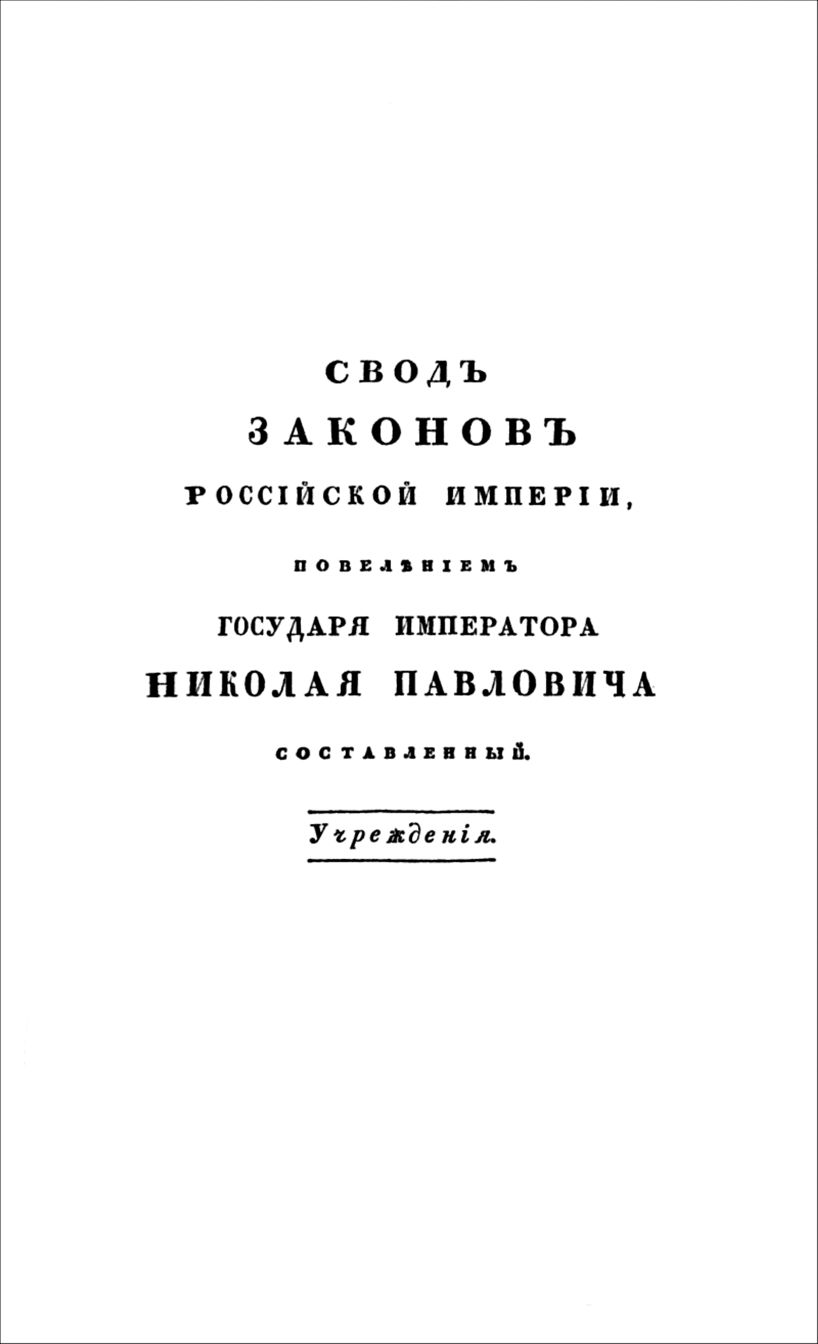 Титульный лист Свода законов Российской империи 1833 года